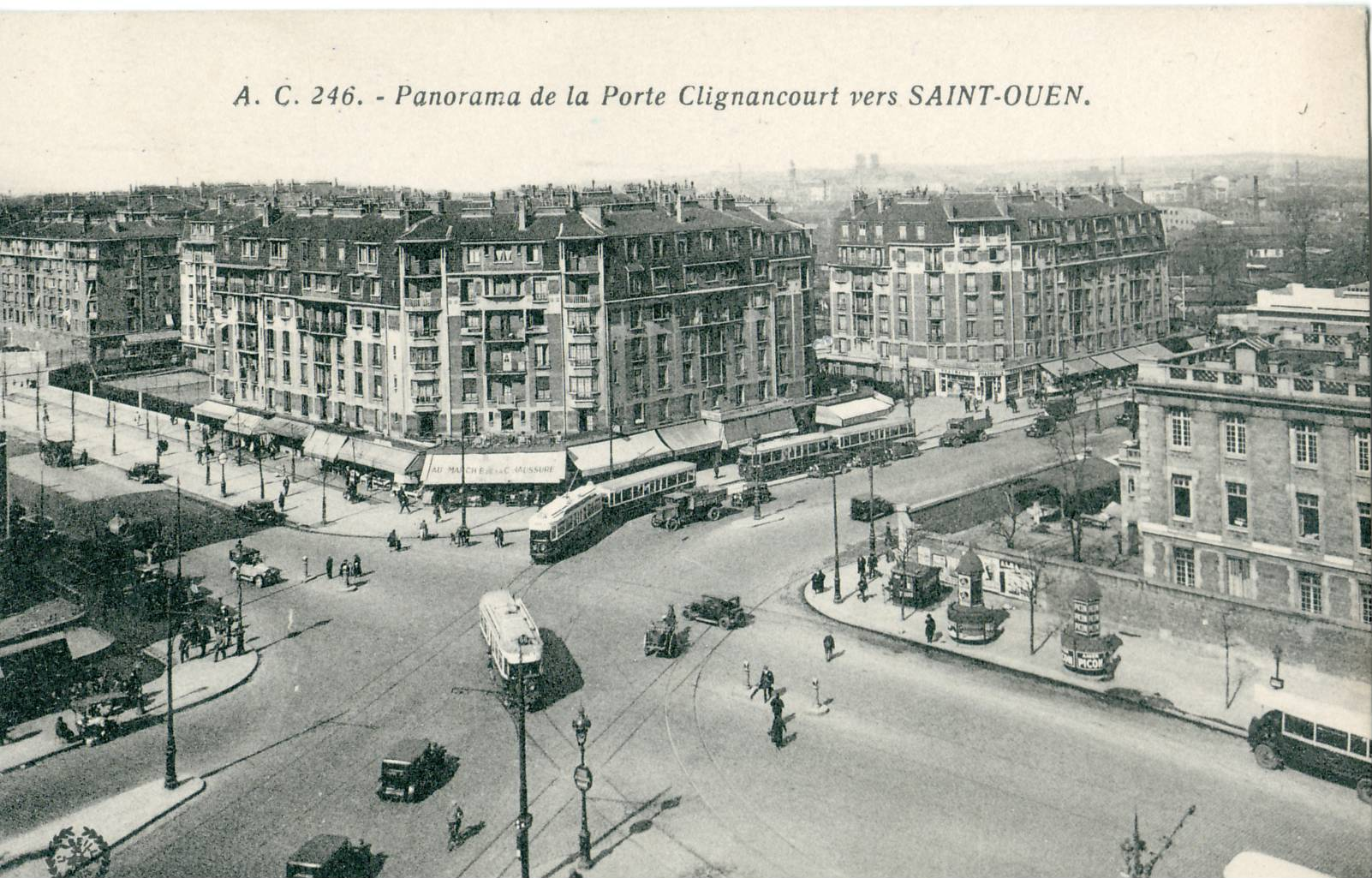 Carte postale ancienne éditée par AC N°246 Panorama de la Porte Clignancourt vers Saint-Ouen à Paris. Nombreux tramways.